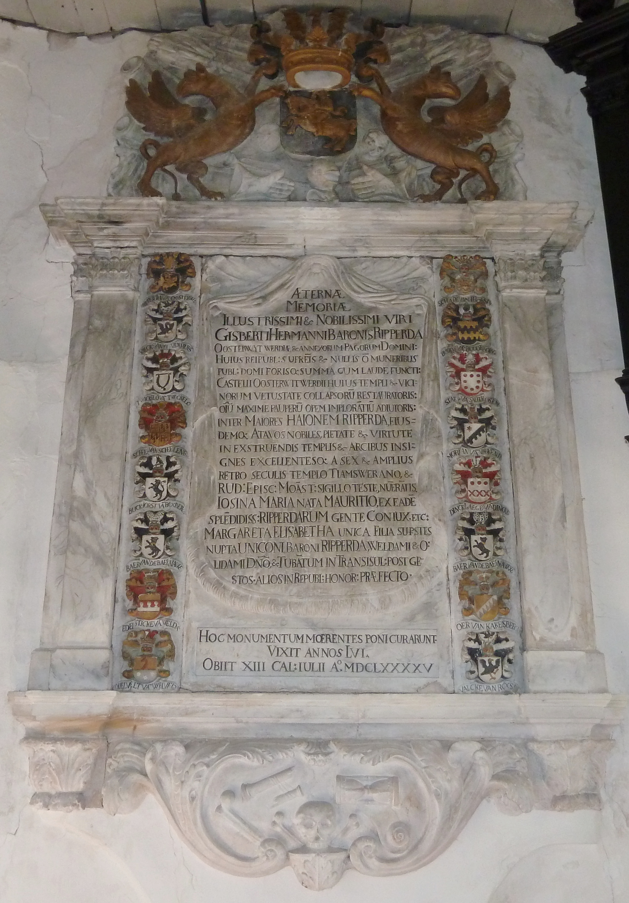 Zandstenen epitaaf van Gijsbert Herman Ripperda (overleden in 1695) [1] in de hervormde kerk in Oosterwijtwerd (Groningen, Nederland).